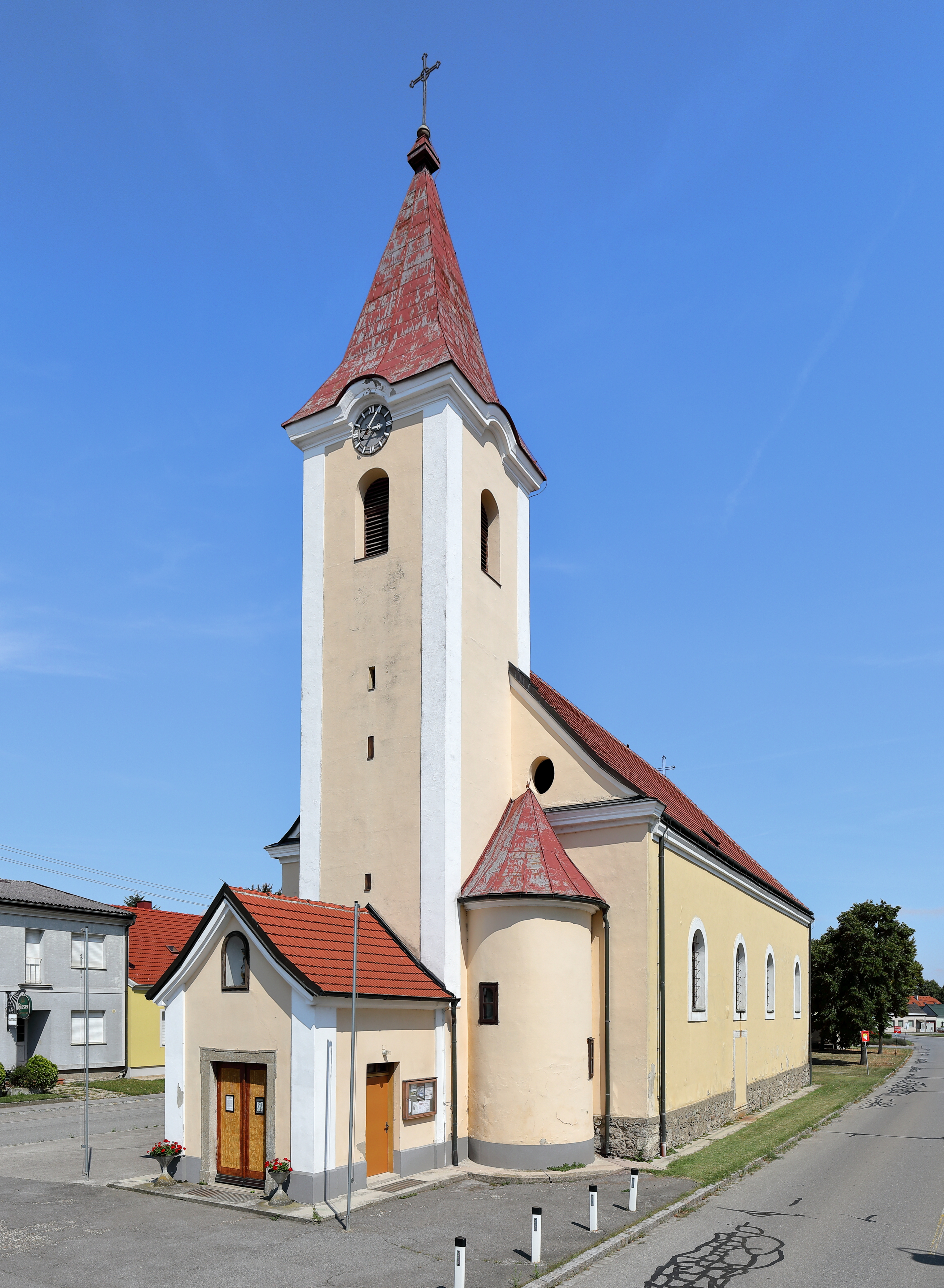 Westansicht der röm.-kath. Pfarrkirche hl. Markus in der niederösterreichischen Marktgemeinde Engelhartstetten. Die Kirche, ein einfacher barocker Sakralbau, wurde in der 2. Hälfte des 18. Jahrhunderts errichtet.